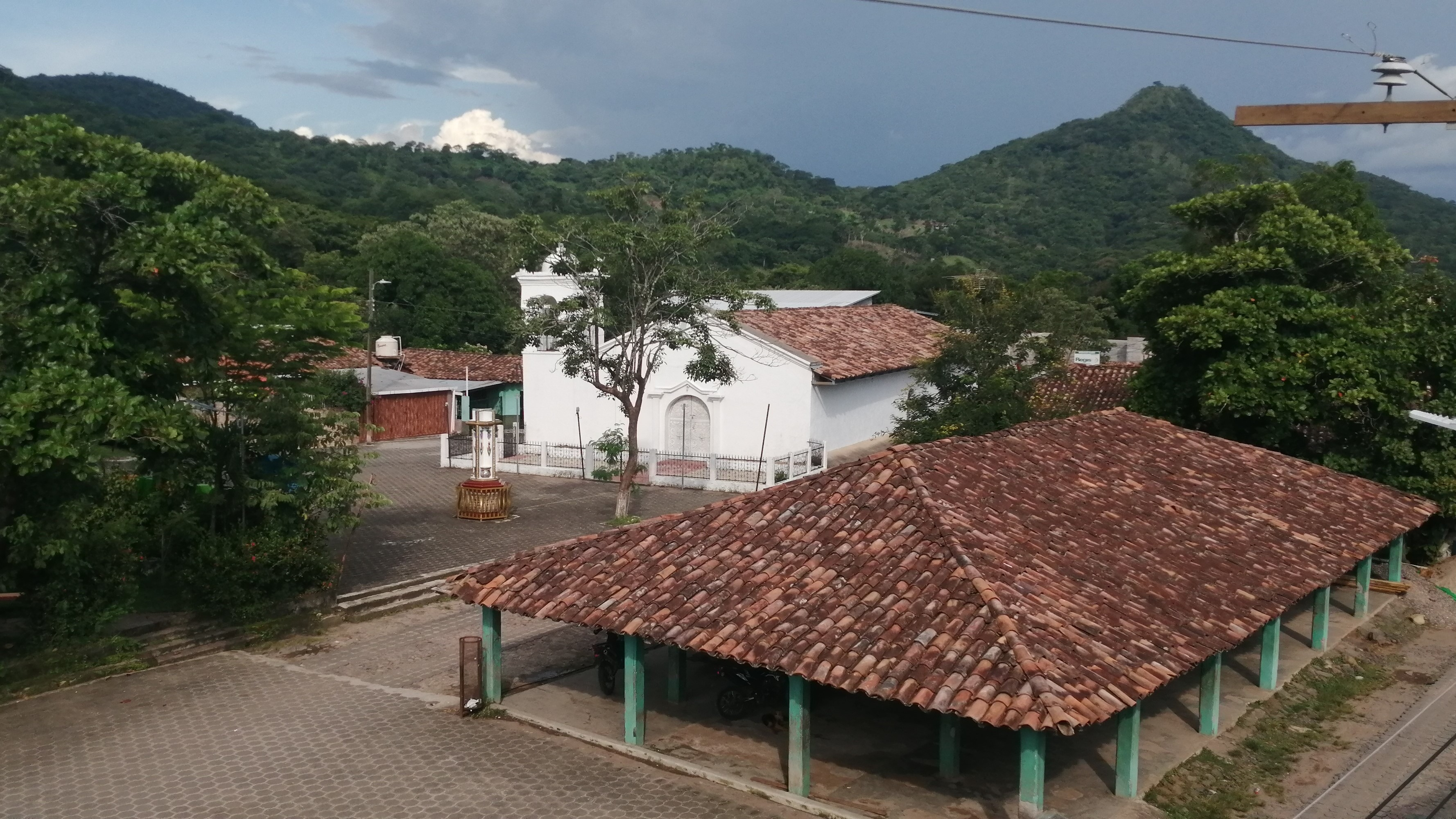 Templo Iglesia Catolica — Magdalena, Intibucá Dept.